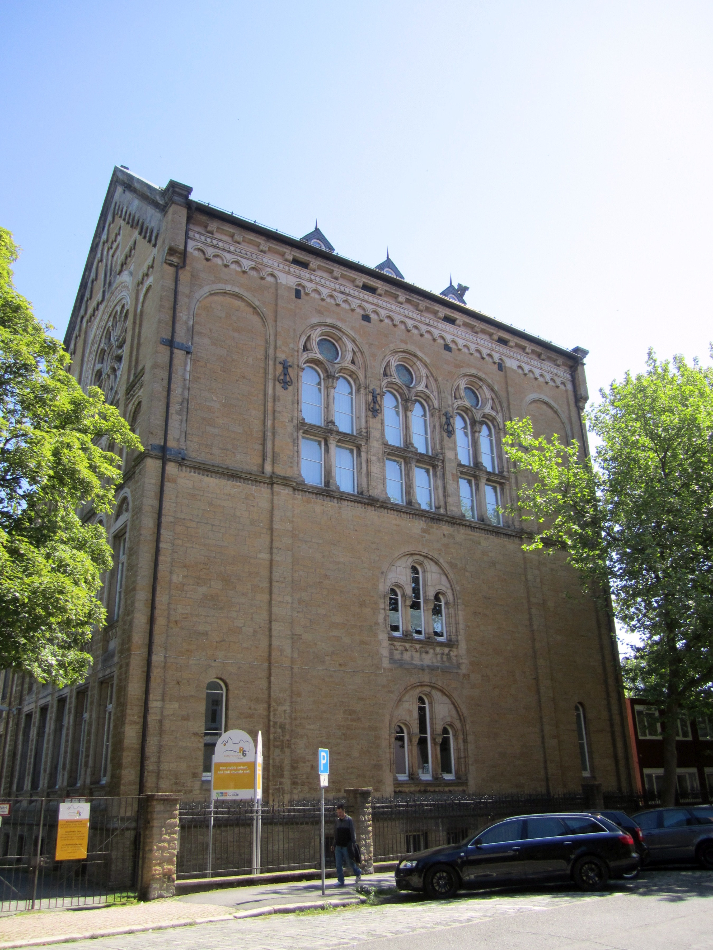 Ratsgymnasium, Goslar, Deutschland.